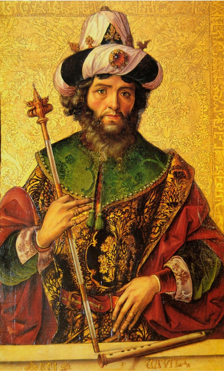 Tabla del "Rey David" de Pedro Berruguete